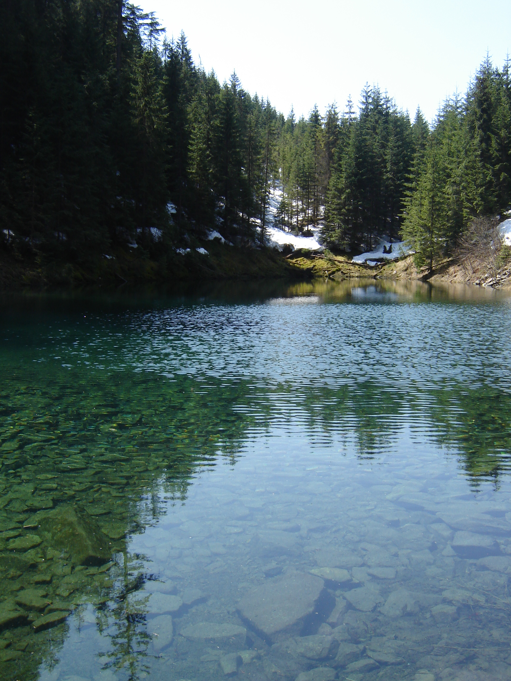 «Гірське озеро „Розсохан“»